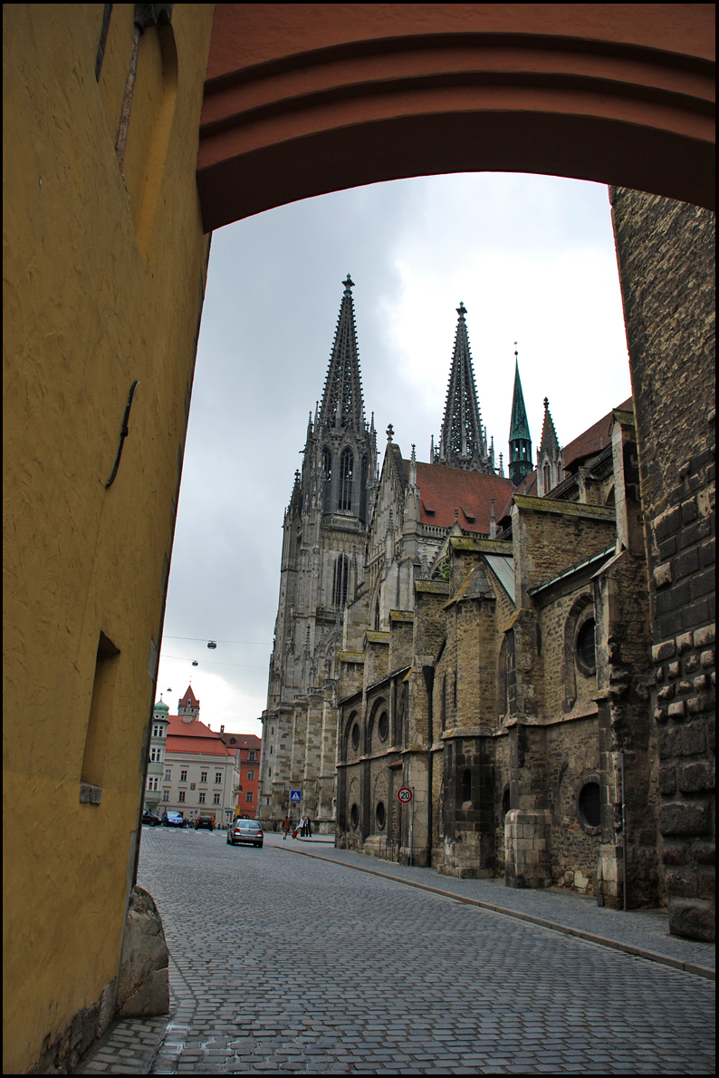 Регенсбург